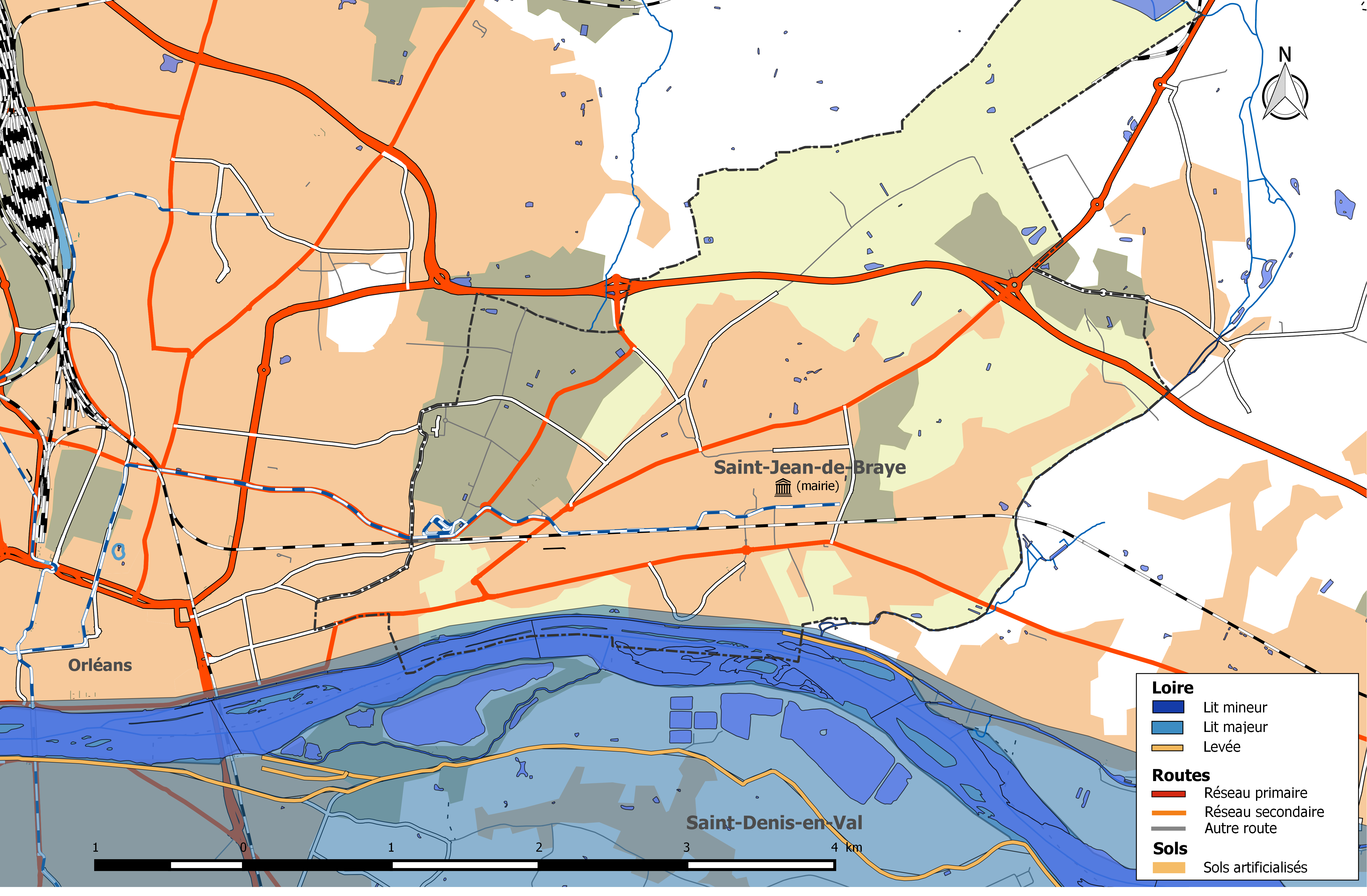 Zone inondable et réseaux hydrographique et routier de la commune de Saint-Jean-de-Braye.